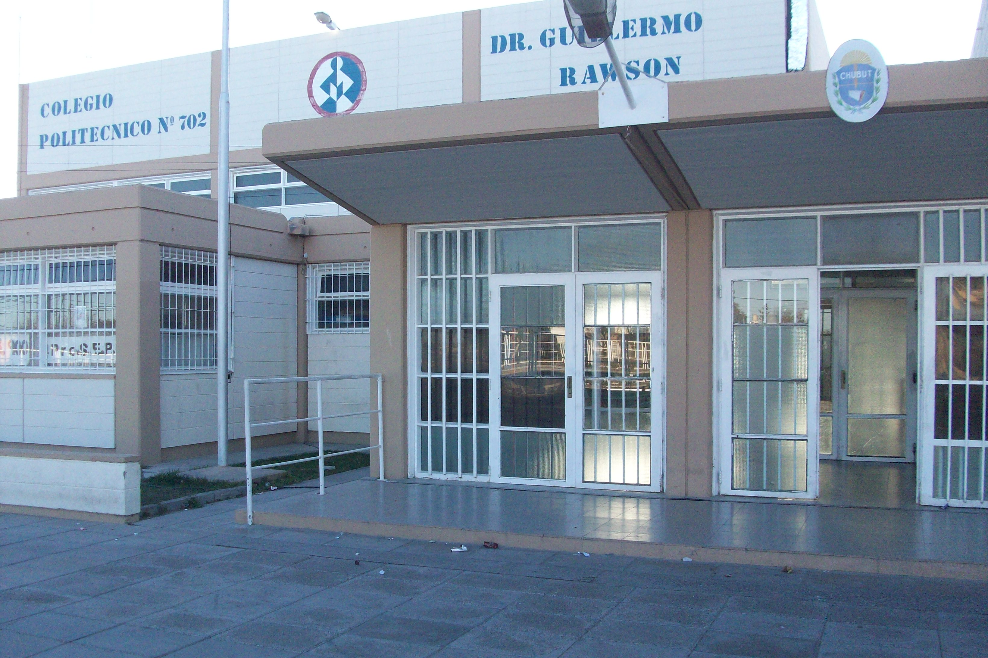 Escuela Politecnica 702